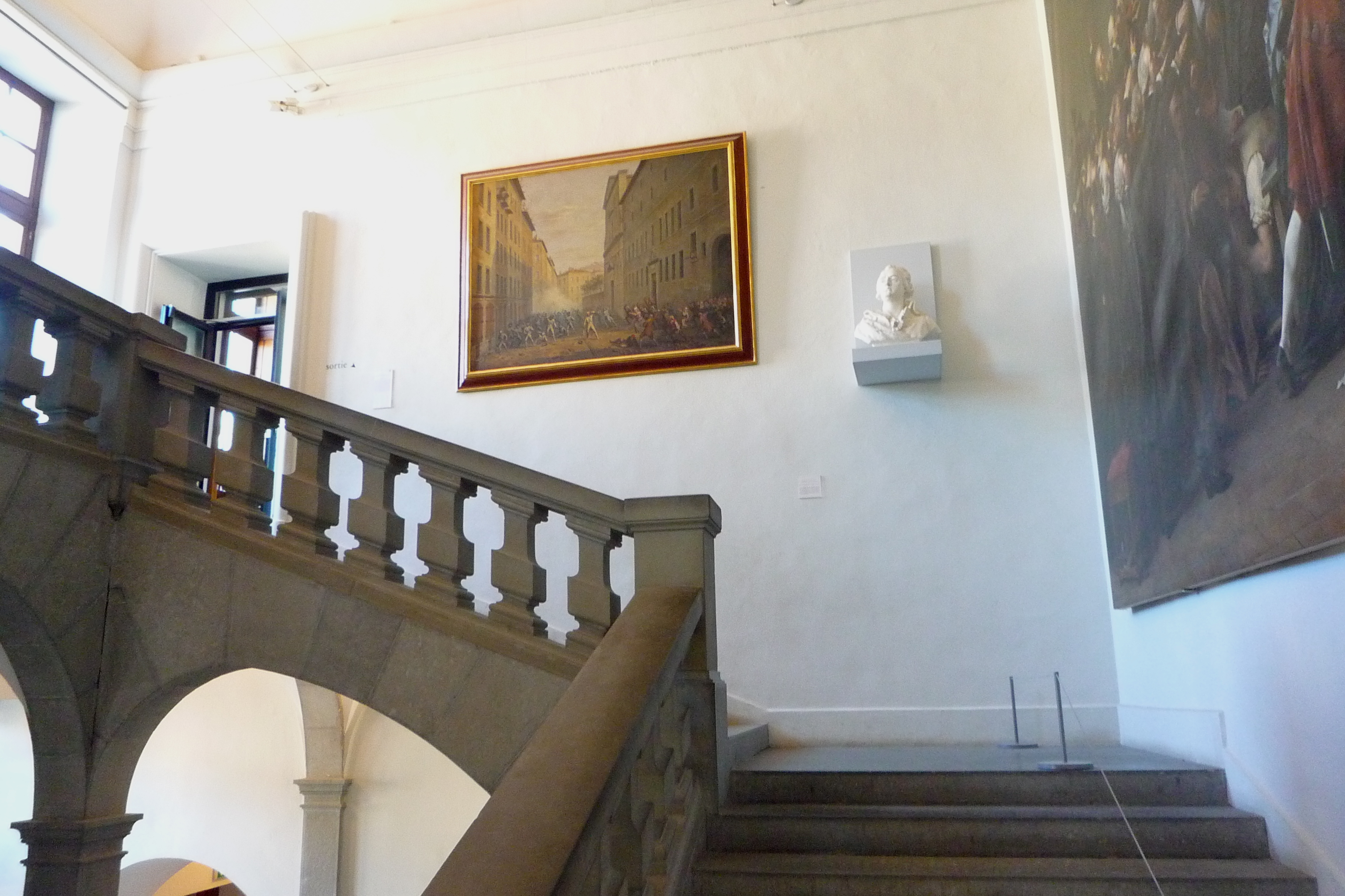 Escalier des droits de l'homme et du citoyen menant du niveau 2 au niveau 3 du Musée de la Révolution française - Vizille (France)